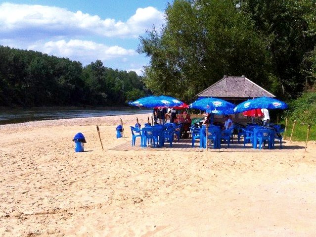 Le resto bar de la plage